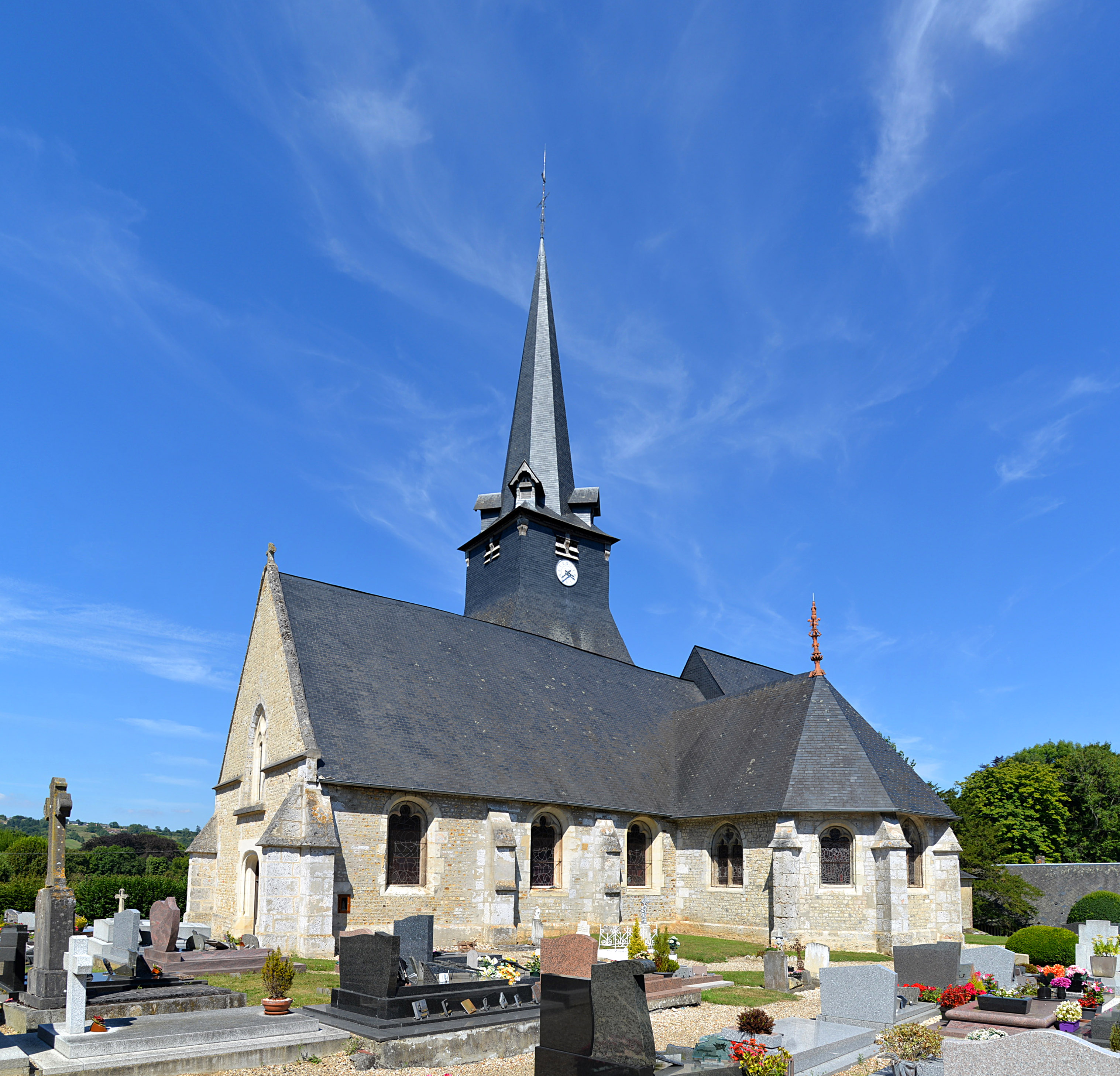 Saint-Julien-sur-Calonne (Calvados)